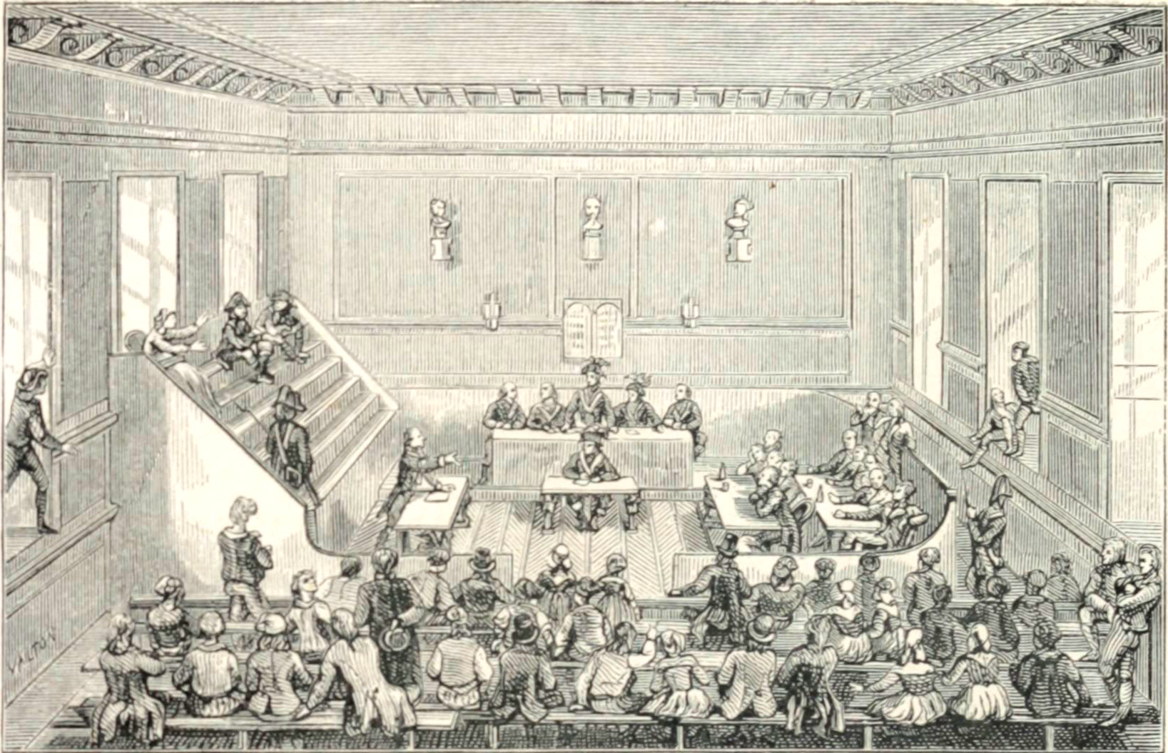 Le tribunal révolutionnaire durant la Révolution française. Gravure publiée dans l'ouvrage de Charles-Aimé Dauban, La démagogie en 1793 à Paris, ou Histoire, jour par jour, de l'année 1793, Paris, H. Plon, 1868.